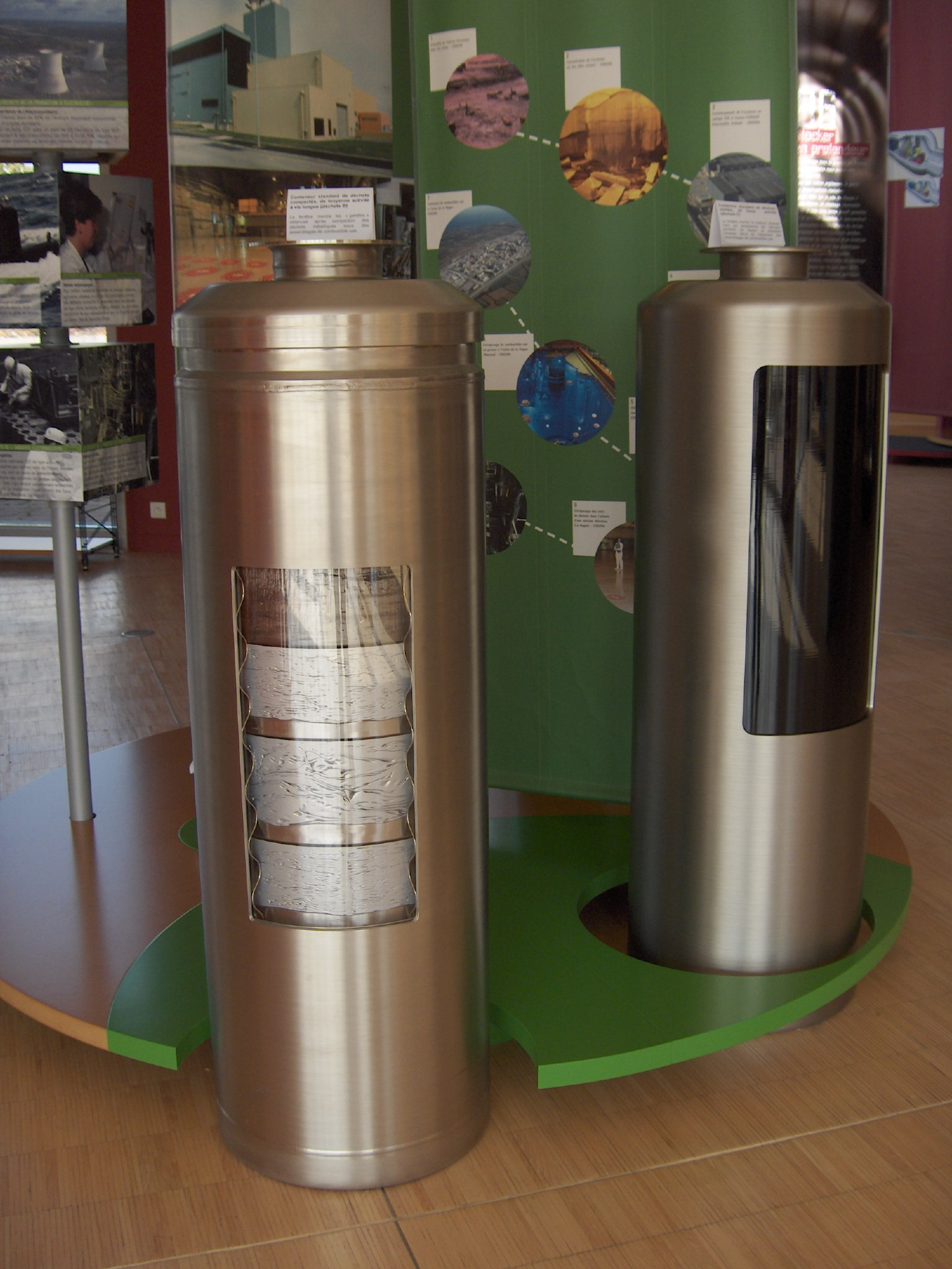 Présentation de deux conteneurs de déchets standards au Laboratoire de recherche souterrain de Meuse/Haute-Marne à Bure. Celui de gauche contient des déchets compactés de moyenne activité à vie longue (déchets B). Dans celui de droite se trouvent des déchets vitrifiés de haute activité (déchets C).